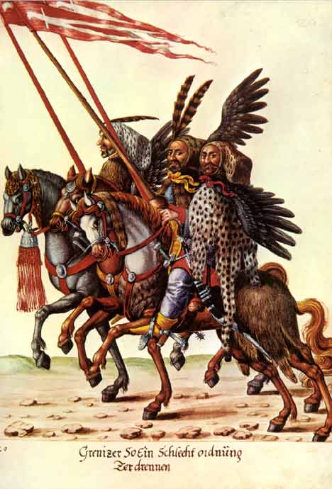 Deli als Grenizer (Grenzsoldaten) mit der Aufgabe, die gegnerische Schlachtordnung zu zertrennen